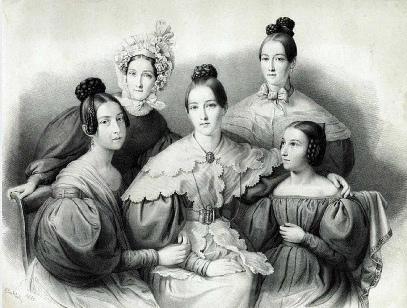 Gruppenbild, sitzend: Frau Barbara von Berckholtz geb. Schröder (* 20. März 1785 in Riga; † 23. Februar 1859 Ortenberg) und den Töchtern Elisabeth (nachmals vermählt Offensandt; 1887 badischer Adelstand als „Offensandt v. Berckholtz“), Olga (1811–1858), Sophie (∞ 1837 ihren verwitweten Schwager Freiherr Paul Friedrich von Moltke) und Alexandra (der nachmaligen Malerin) (vgl. Die Ortenau: Zeitschrift des Historischen Vereins für Mittelbaden, 37. Heft 1957, S. 49)